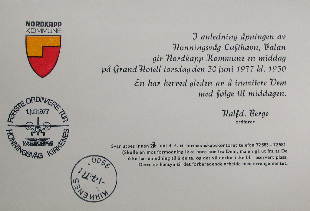 Innbydelse til åpningen av Honningsvåg Lufthavn, Valan